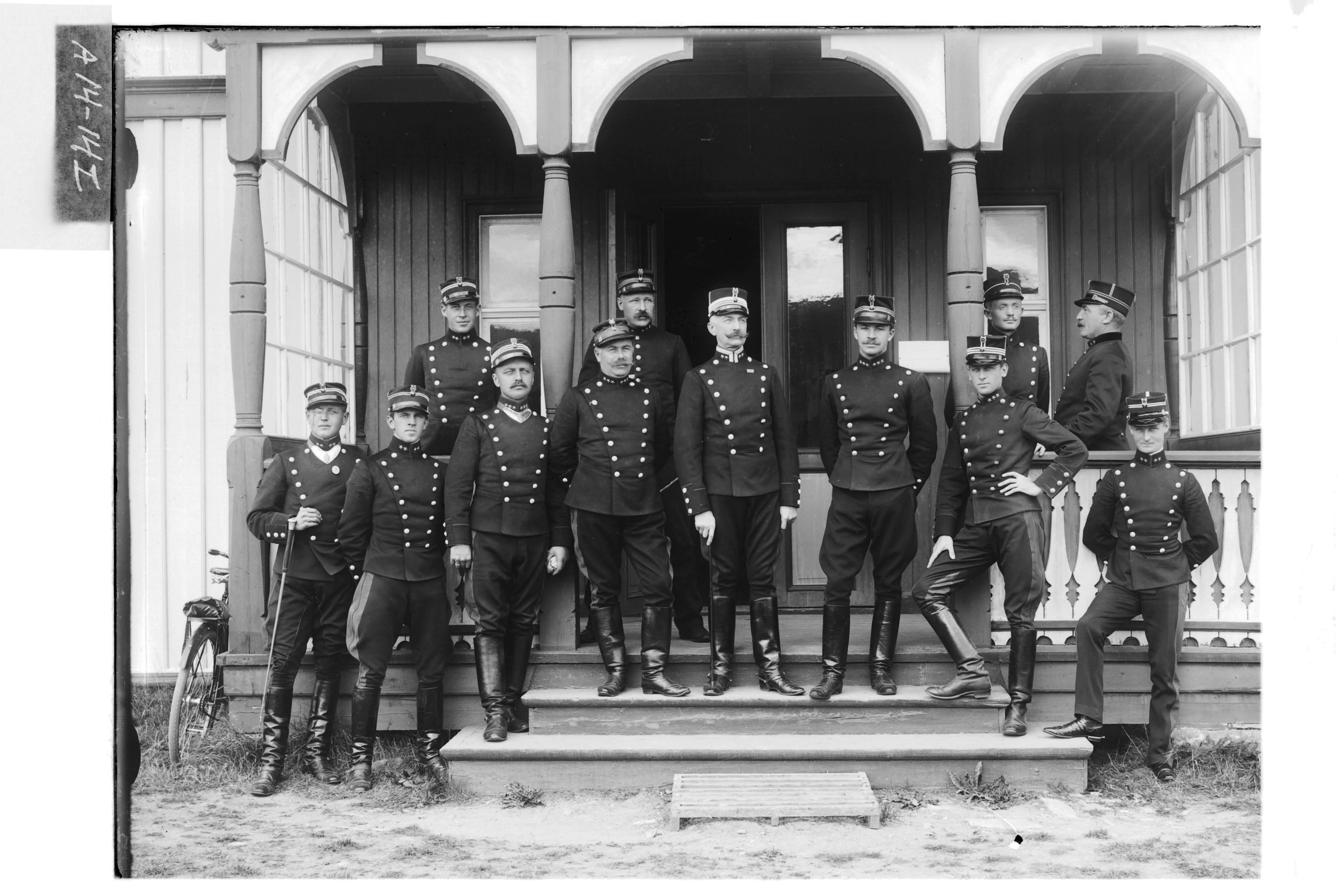 Kavalerister på Garnes